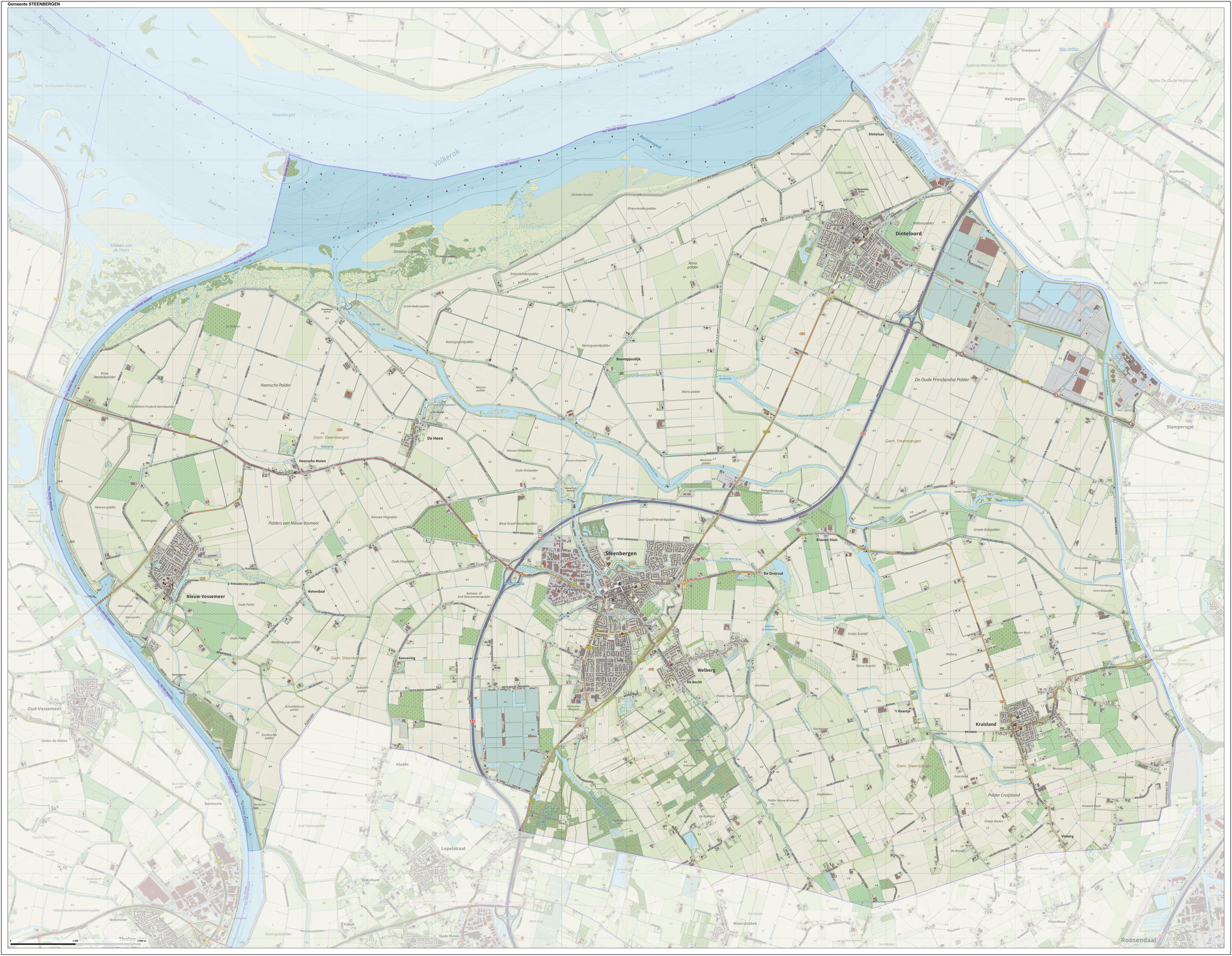 Topografische gemeentekaart. Resolutie: 400 pixels/km. Kaartbeeld samengesteld uit de open geodata van de Top10NL en Top25namen (Kadaster), Creative Commons-BY licentie. Gebouwvlakken uit open geodata BAG extract. Wegen uit de OpenStreetMap, OpenStreetMap community. Reliëfschaduw uit de Actuele Hoogtekaart AHN2. Samenstelling en kleurenschema: Jan-Willem van Aalst, met QGIS. Zie ook de Legenda.